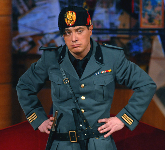 Foto di Barbagli, personaggio di Corrado Guzzanti